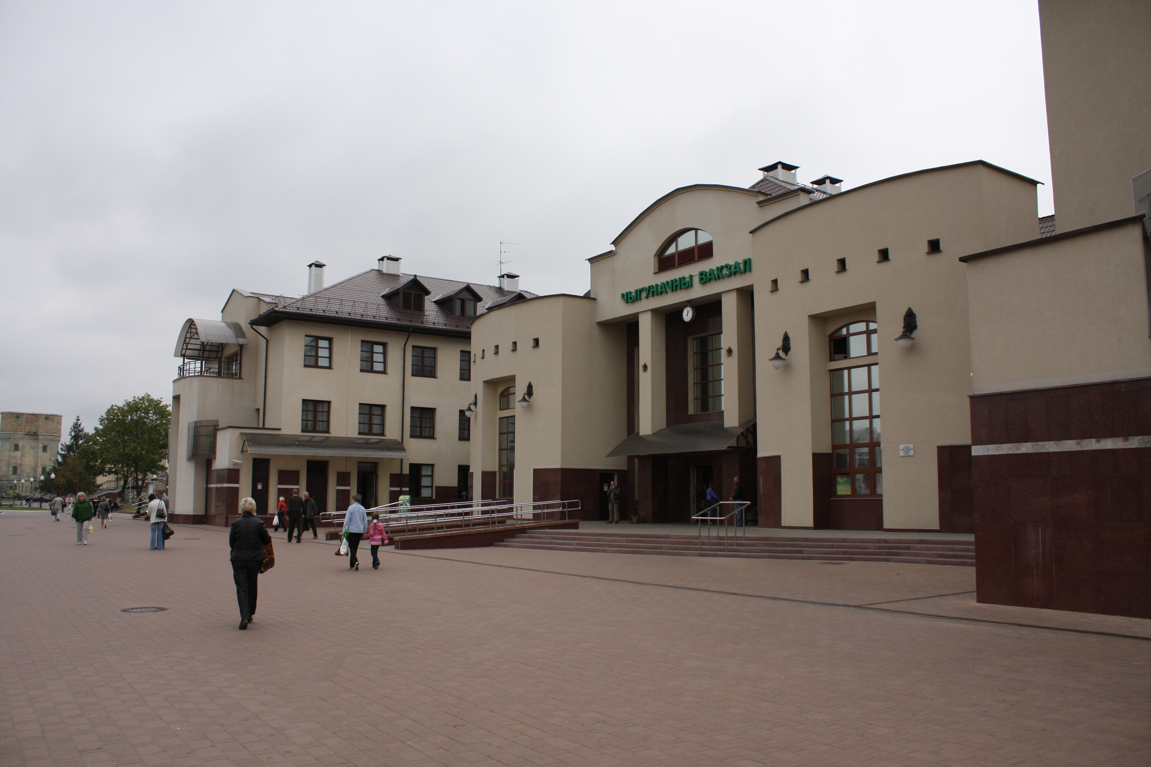 Станцыя Пінск